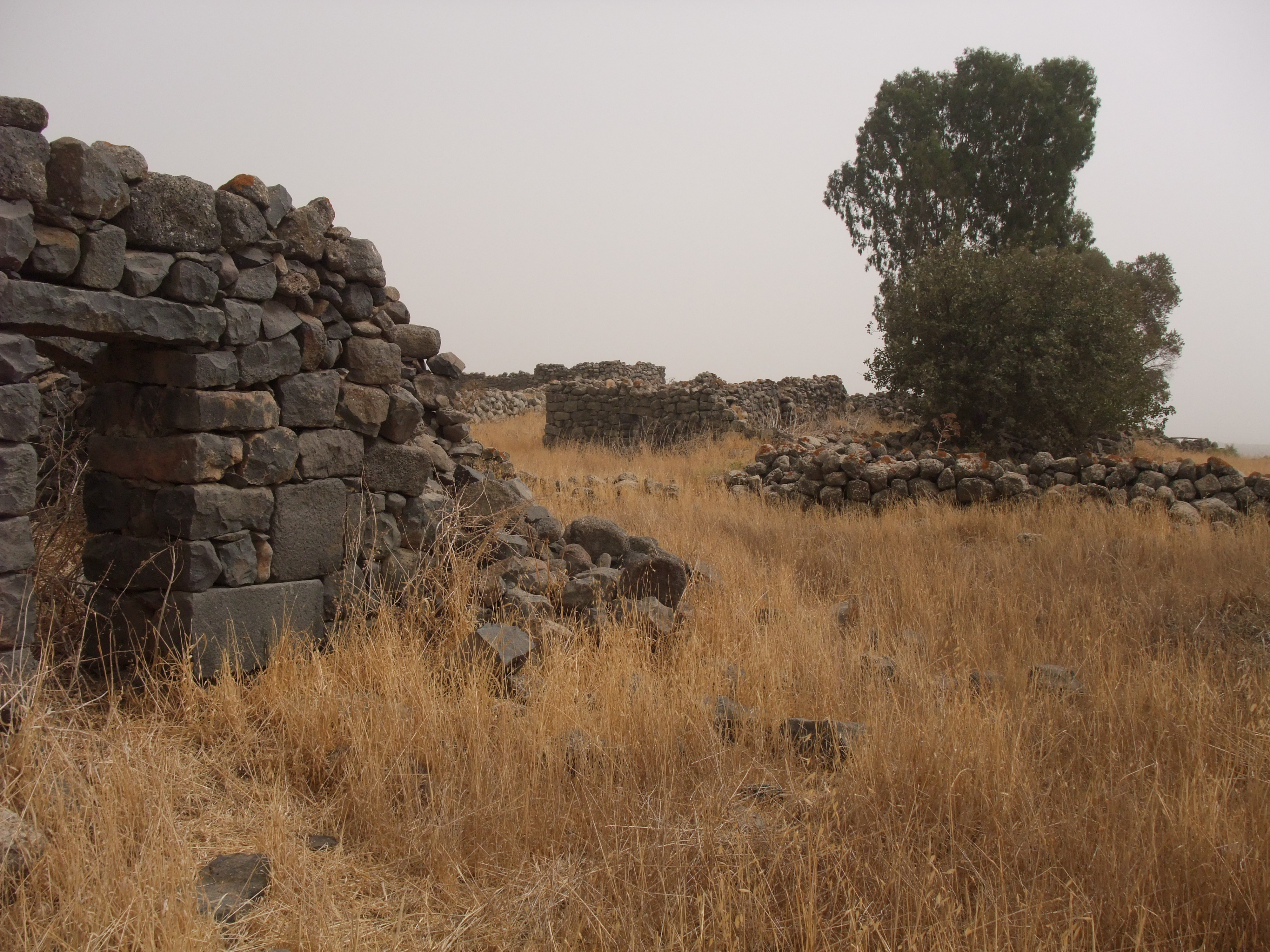 כפר דבורה